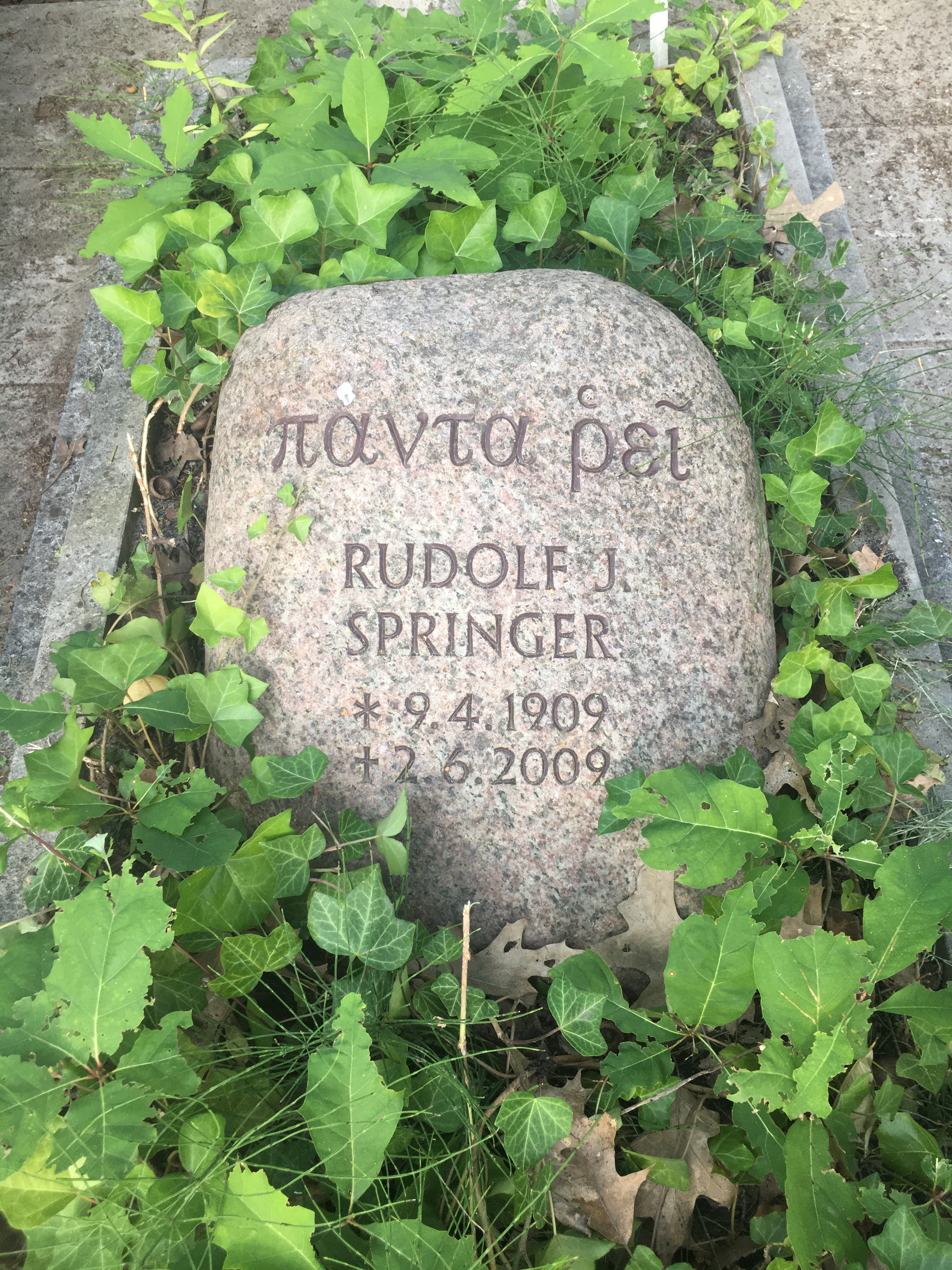 Grabstätte Rudolf Springer